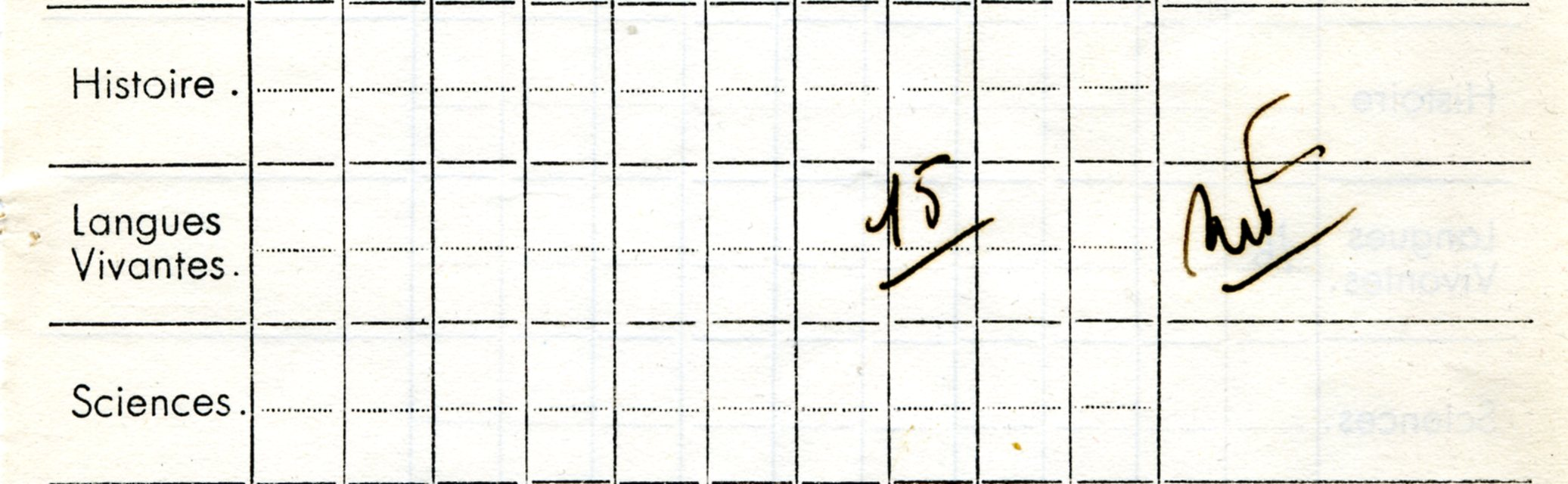 Carnet de notes rempli par le chanteur français Maurice fanon en juin 1955.